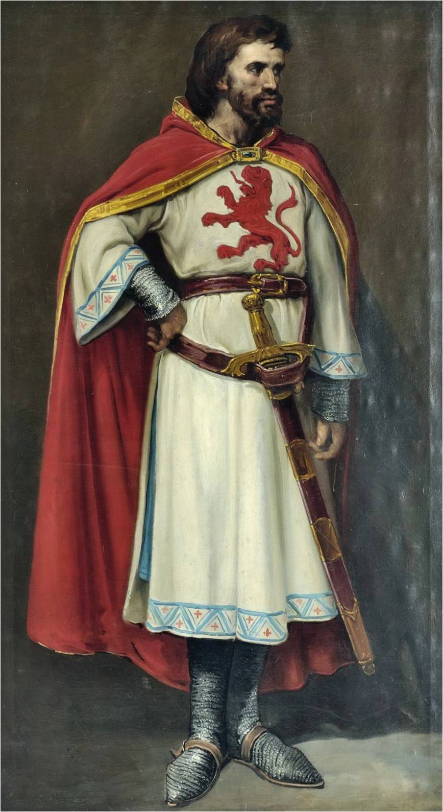 Retrato imaginario del rey Ramiro II de León (c.898-951). Fue hijo del rey Ordoño II de León y de la reina Elvira Menéndez. Luchó contra los musulmanes y derrotó a las huestes del califa omeya Abderramán IIIen la batalla de Simancas, librada en el año 939.